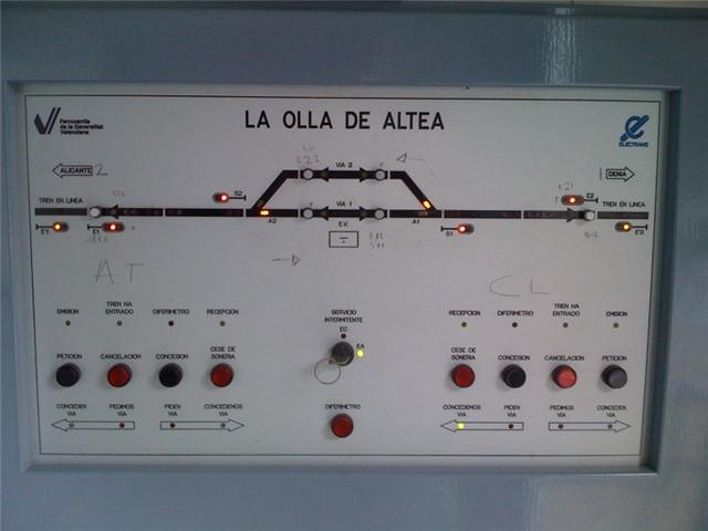 Pupitre Dimbloc tipo mural de la empresa Electrans (Bloqueo Eléctrico Manual) instalado en 2009 en la Estación de Olla Altea (Altea, Alicante) en Ferrocarrils de la Generalitat Valenciana (FGV), antigua FEVE. El mural dimbloc establece la circulación entre las estaciones de Calpe y Altea, las colaterales abiertas.